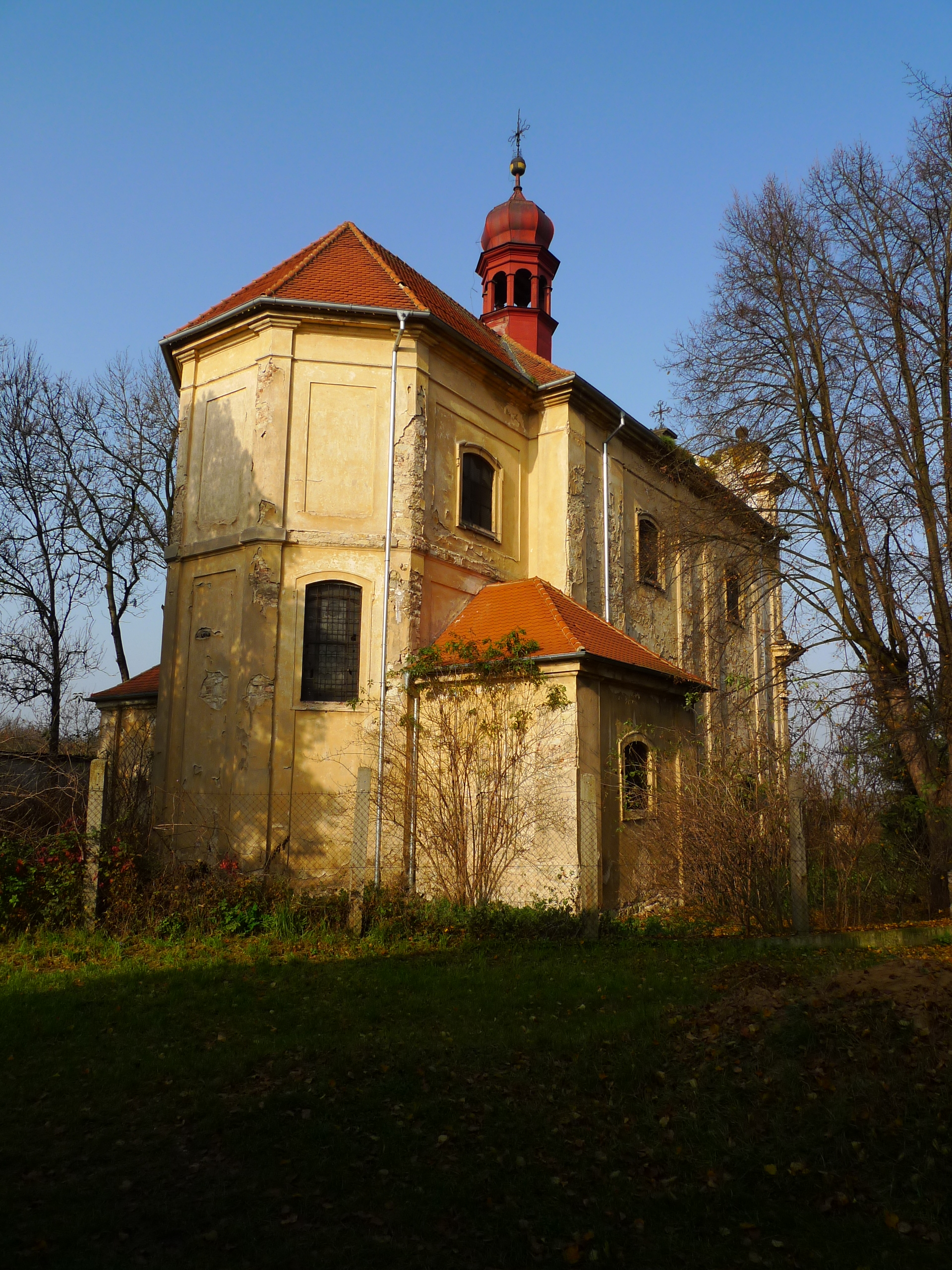 Kostel svatého Jiljí, Dolánky nad Ohří.